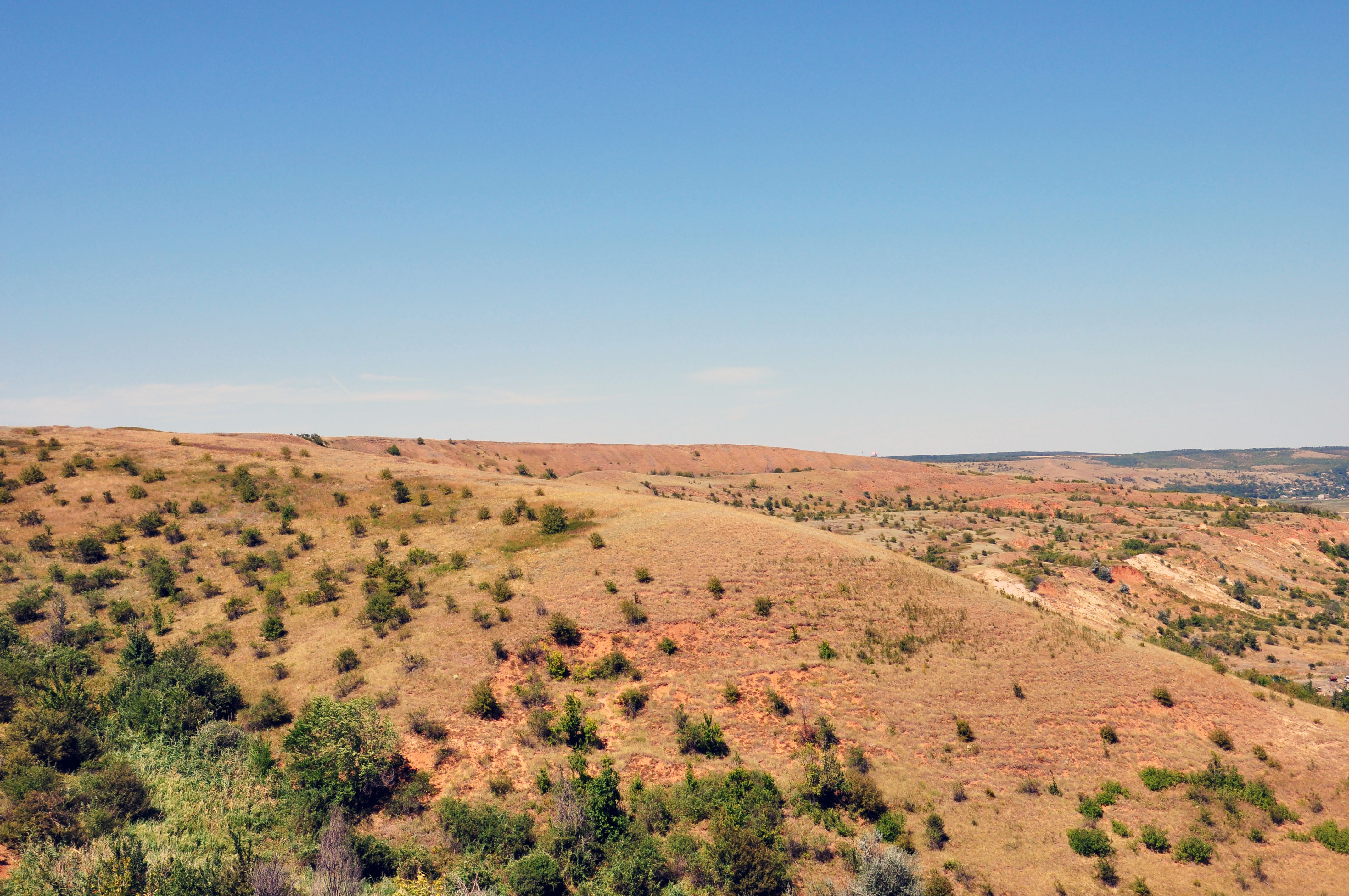 Раздорские склоны: Усть-Донецкий район, Ростовская область This image is related to the protected area of Russia number 6110164